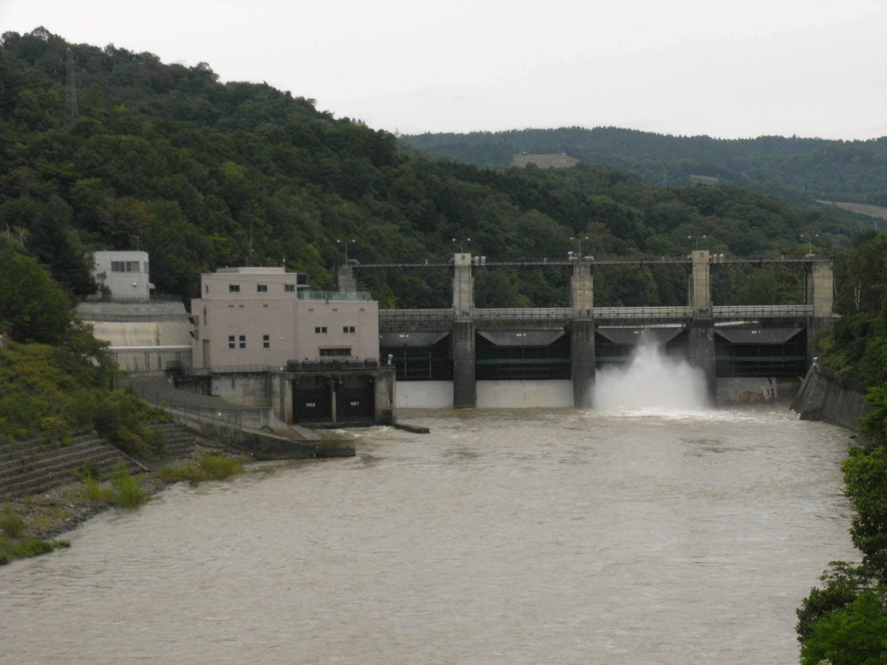 Dam